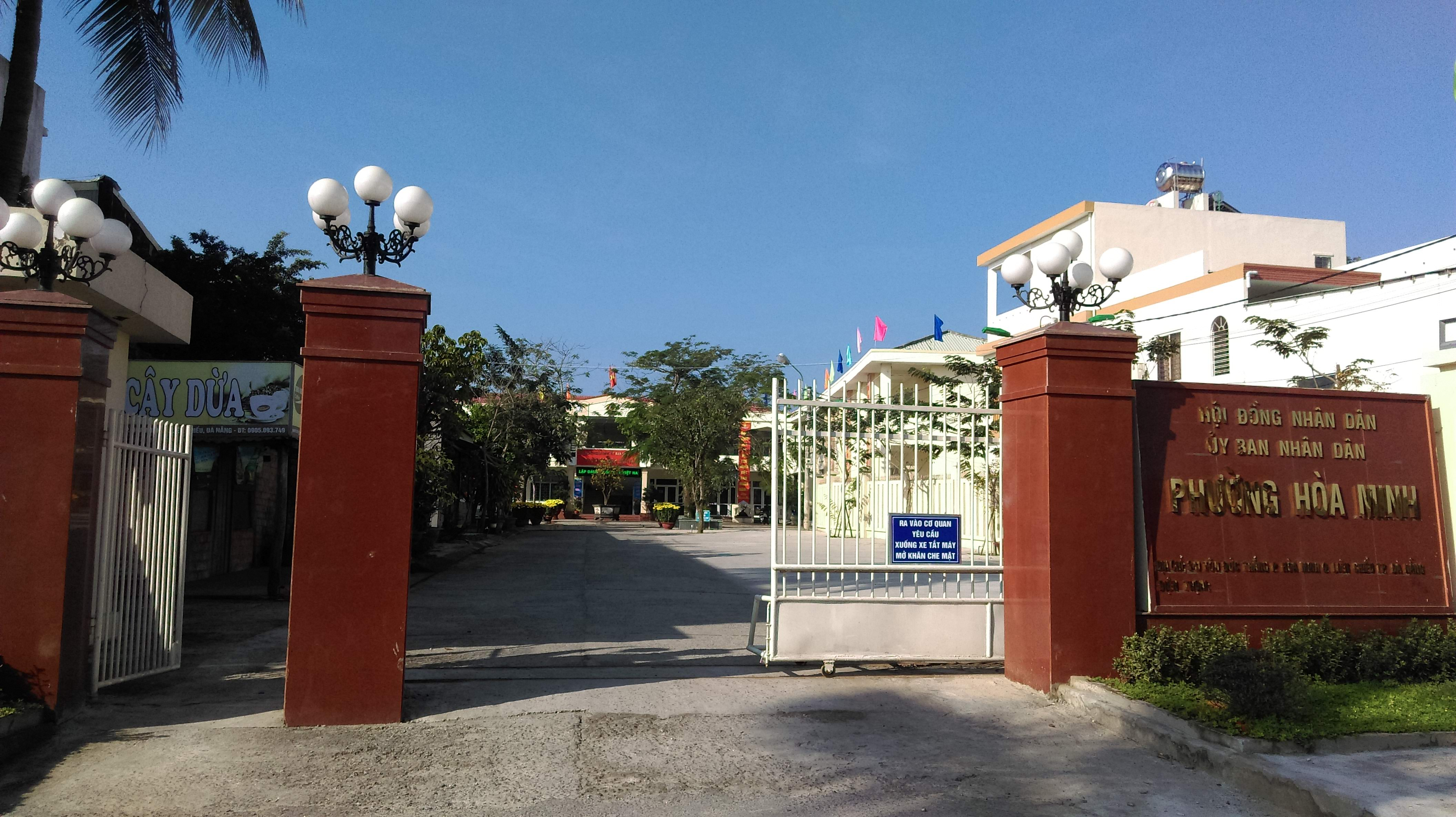 UBND phường Hòa Minh, Liên Chiểu, Đà Nẵng